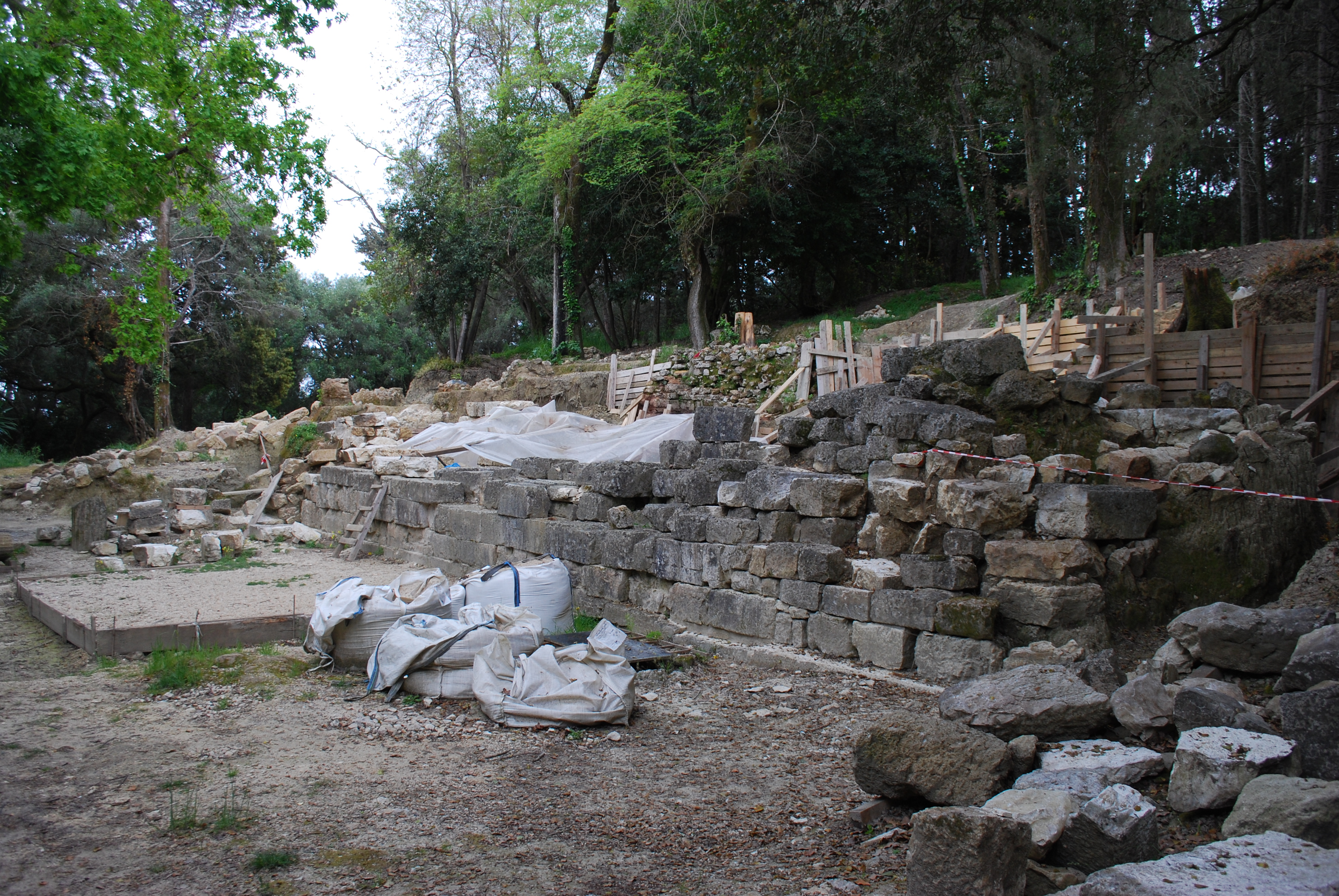 Vue du site archéologique de Paleopoli à Corfou.